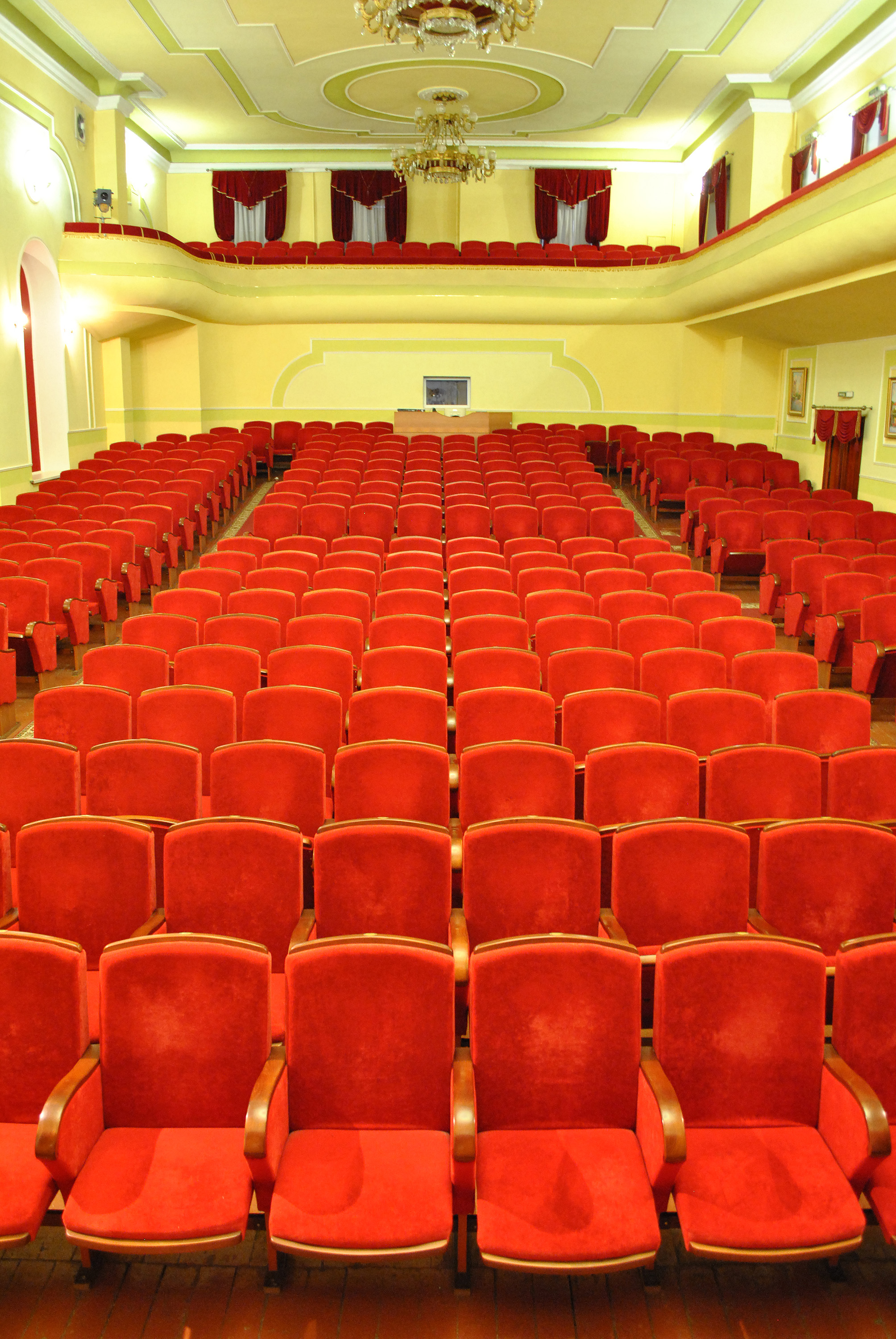 Колишній будинок «Міщанського братства», нині — приміщення Тернопільської обласної філармонії. Глядацька зала.